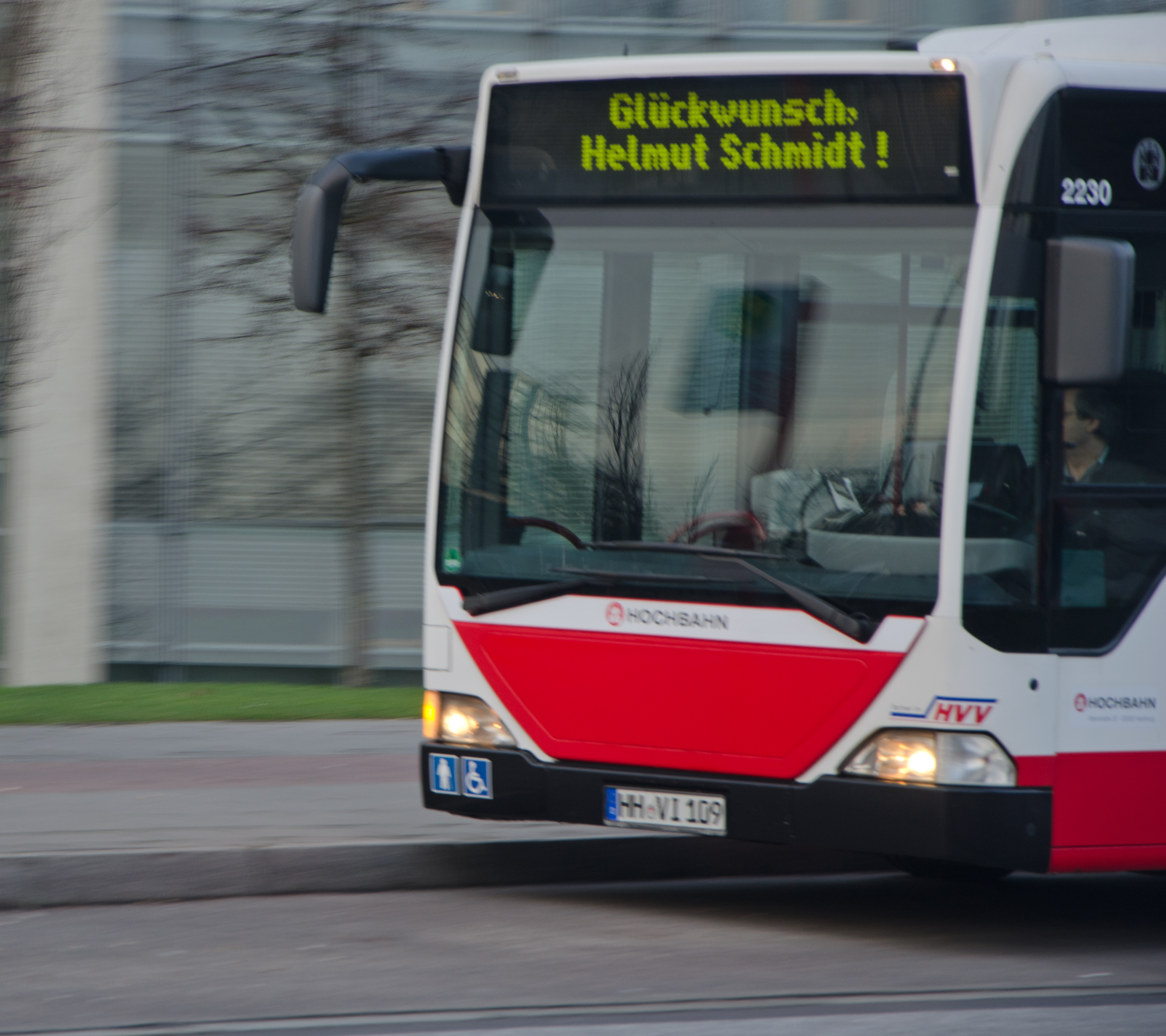 HVV-Bus zum 95.Geburtstag von Helmut Schmidt am 23.12.2013